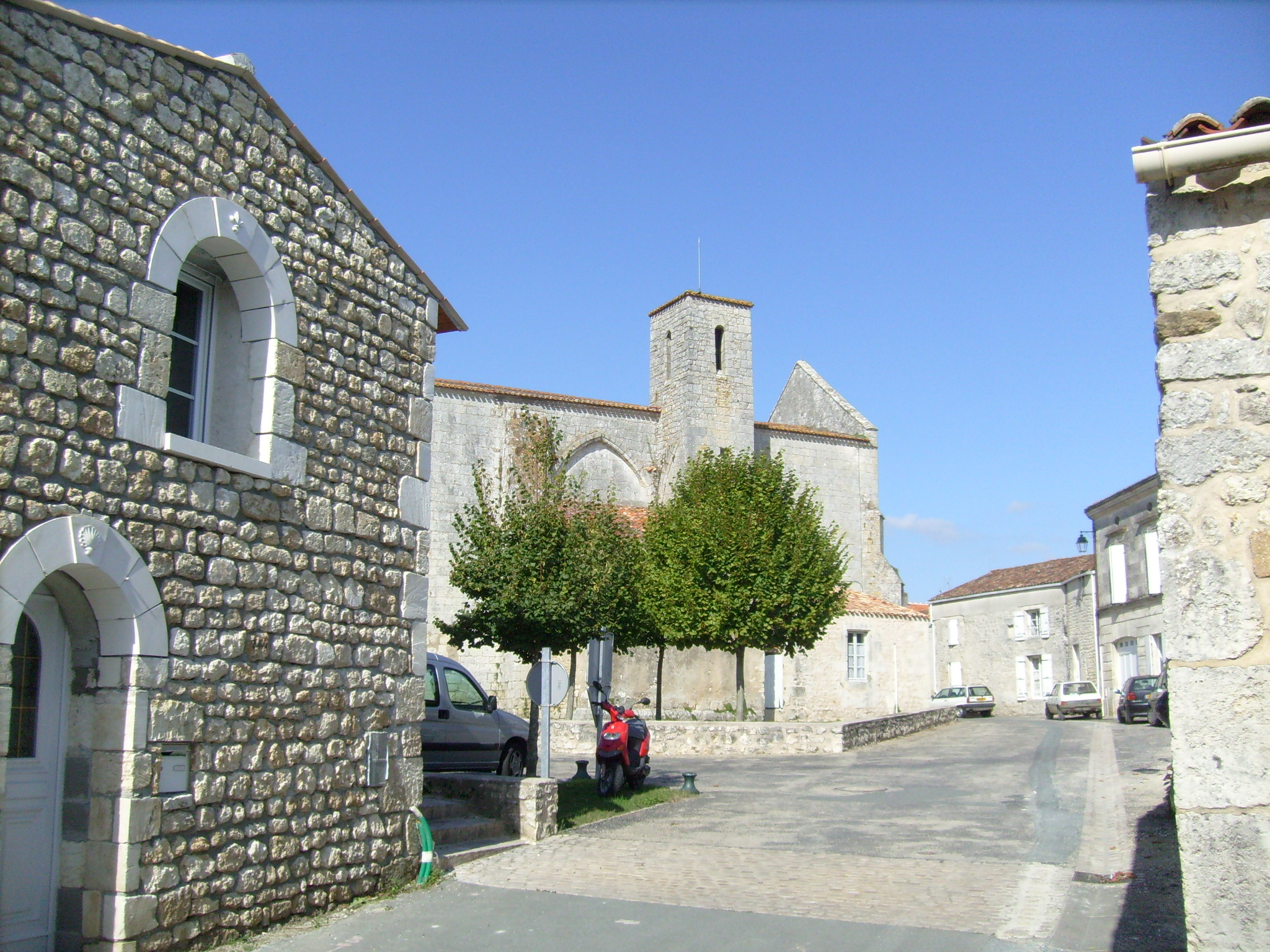 Une rue du village de Nancras